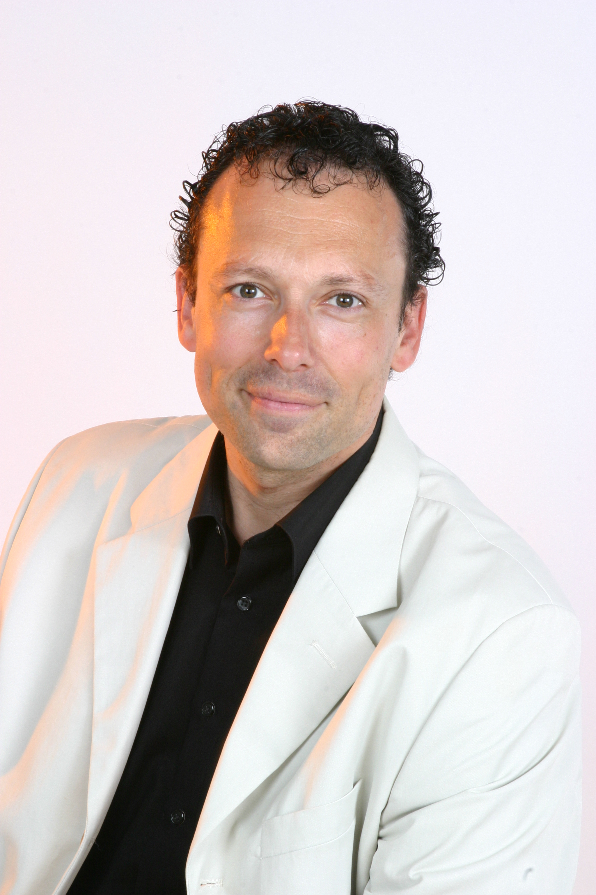 Wolf FRANK